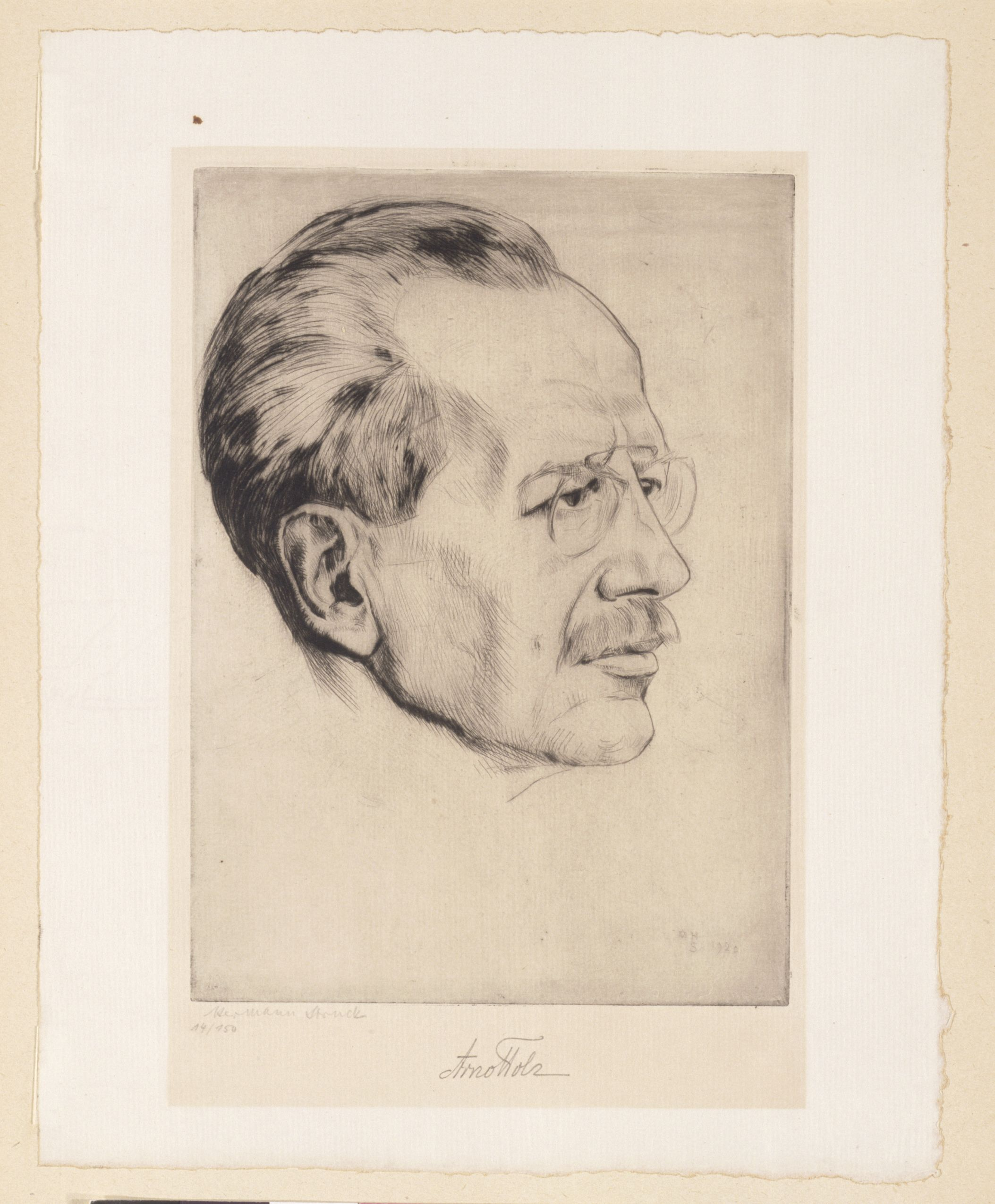 Artwork by Hermann Struck Dargestellte Person: Holz, Arno (26.4.1863 - 26.10.1929), DNB-Link Datierung Display: 1920 Objektart: Radierung Schlagworte Inhalt /Geografie: Mann, Porträt, Brille Schlagworte Kontext: Schriftsteller